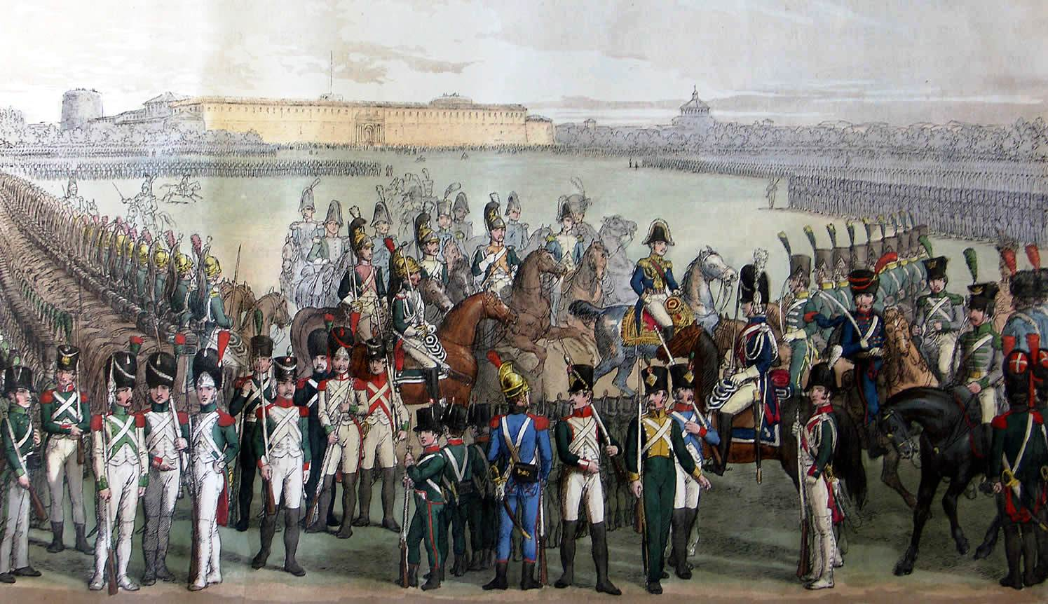 Parade des Italienischen Militärs vor Eugène de Beauharnais in Mailand 18.2.1812